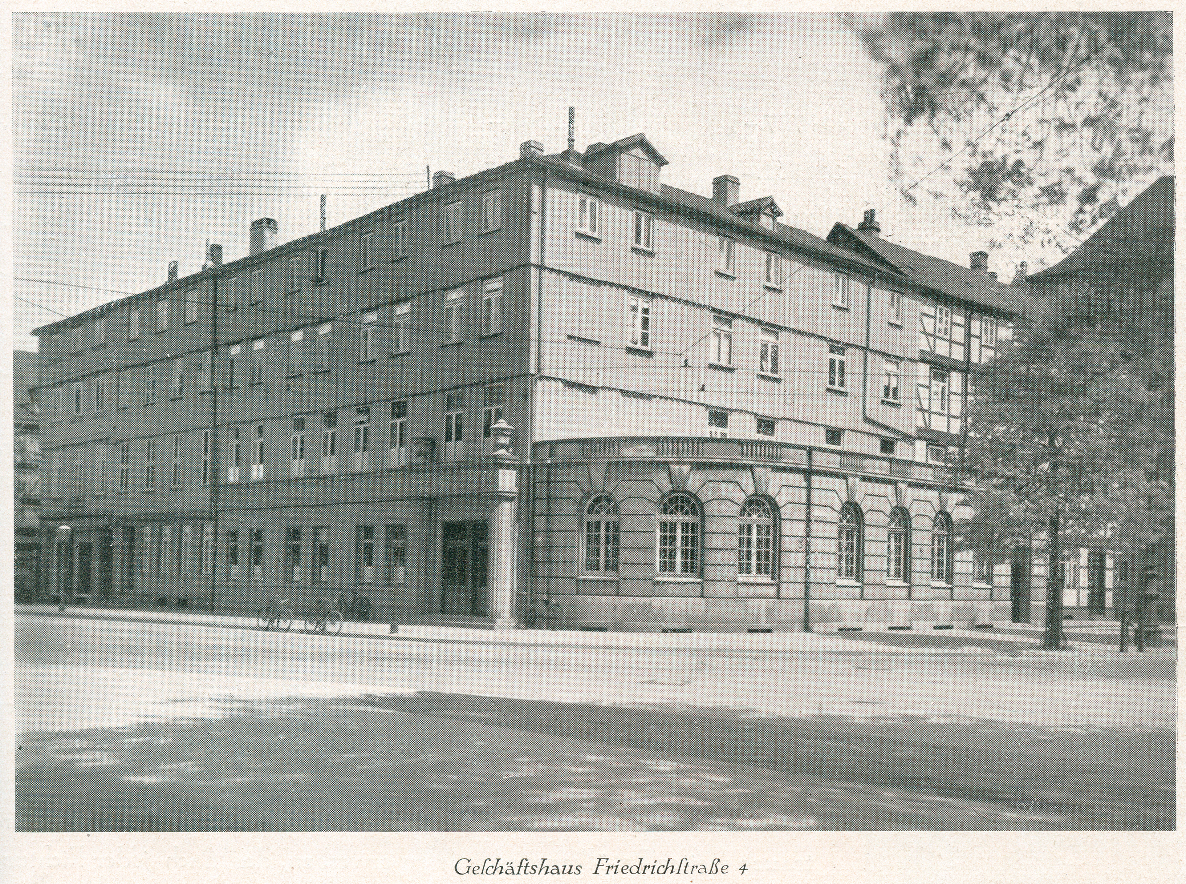 Das Geschäftshaus der 1878 gegründeten und anfangs von Louis Glackemeyer, August Weber und Fr. Wellhausen ehrenamtlich geleiteten Genossenschaftsbank Creditbank zu Hannover unter der ehemaligen Adresse Friedrichstraße 4 Ecke Osterstraße in Hannover. Zusätzlich zu diesem Gebäude gab es in den 1920er Jahren zudem eine Geschäftsstelle in Döhren unter der ehemaligen Adresse Hildesheimer Chausee 13. Die Bank fusionierte 1932 in die heutige Hannoversche Volksbank ...